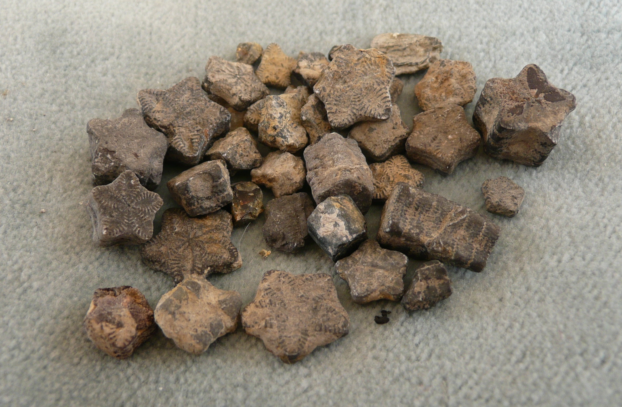 étoiles brutes